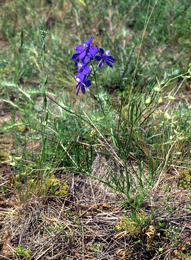 Gewöhnlicher Feldrittersporn (Consolida regalis), Hahnenfußgewächse (Ranunculaceae) - Tschechien/Česká republika/Czech Republic: Kraj Vysočina, Okres Třebíč, Jihlava-Tal bei Mohelno